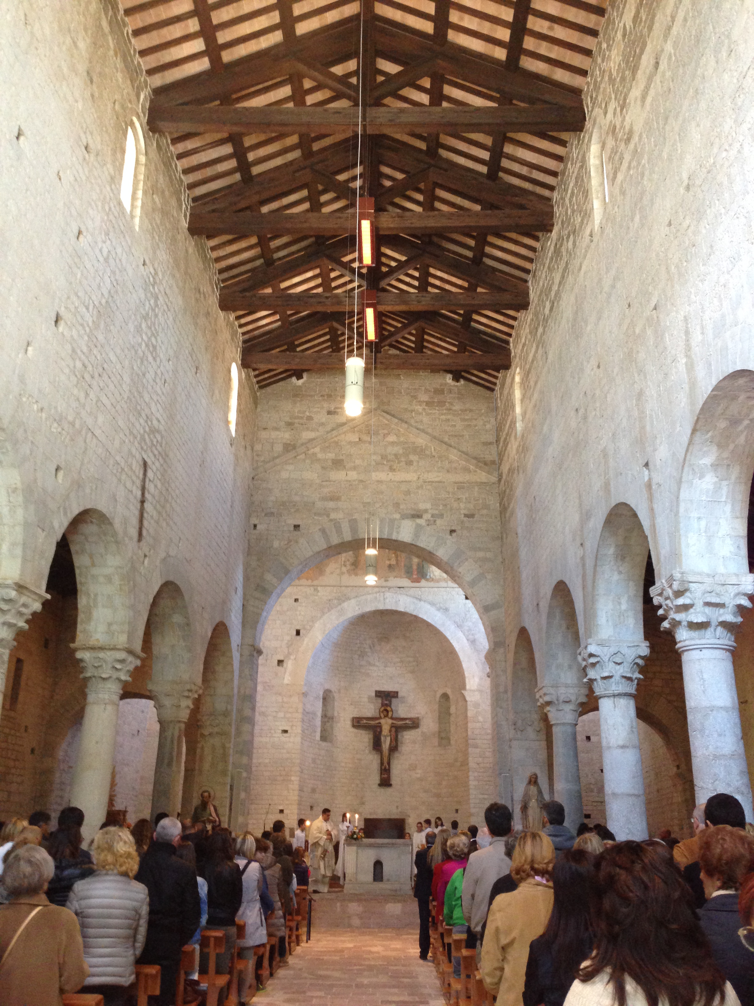 Chiesa di San Paolo. Spoleto. Navata centrale